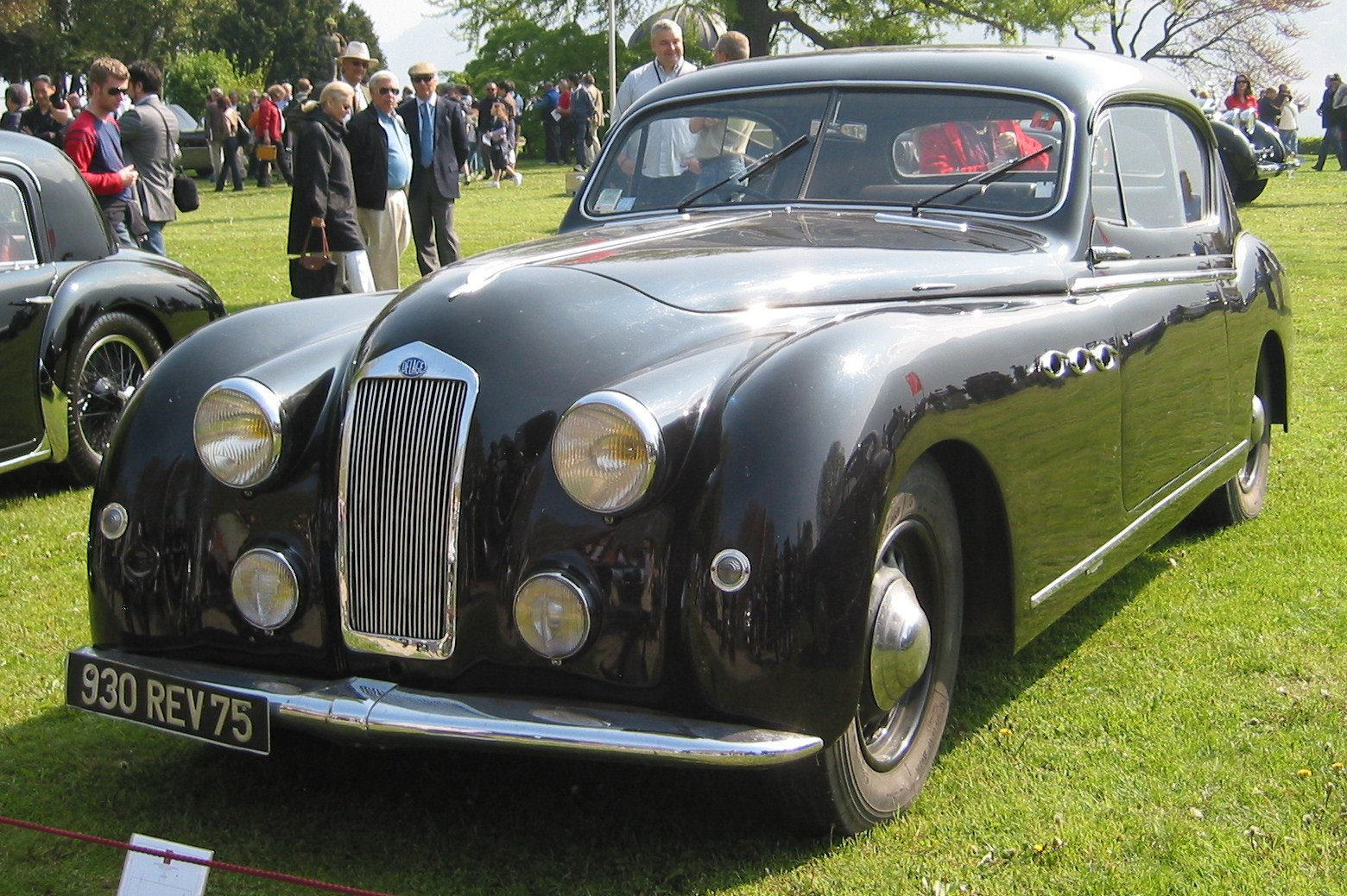 Delage D6 3 Litre Coach von Letourneur & Marchand 1947